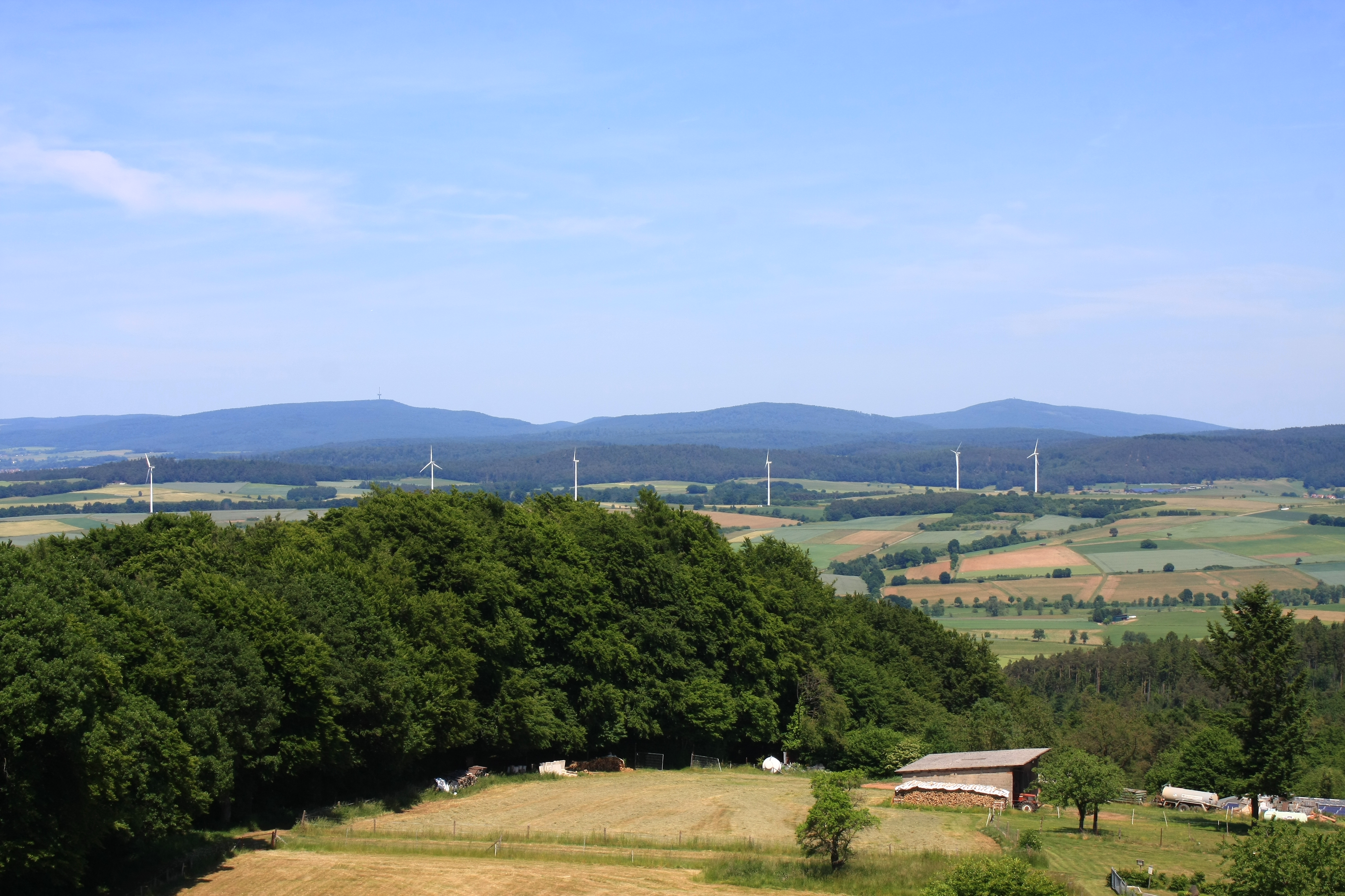 Der Kellerwald mit Hohem Lohr (657 m, links), Jeust (585 m, Mitte) und Wüstegarten (675 m, rechts) vom 380 m hohen Burgholz, der, wie auch alle Erhebungen im Vordergrund, zu den Gilserberger Höhen gehört, aus gesehen.